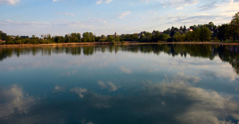 Lac de Clairvaux